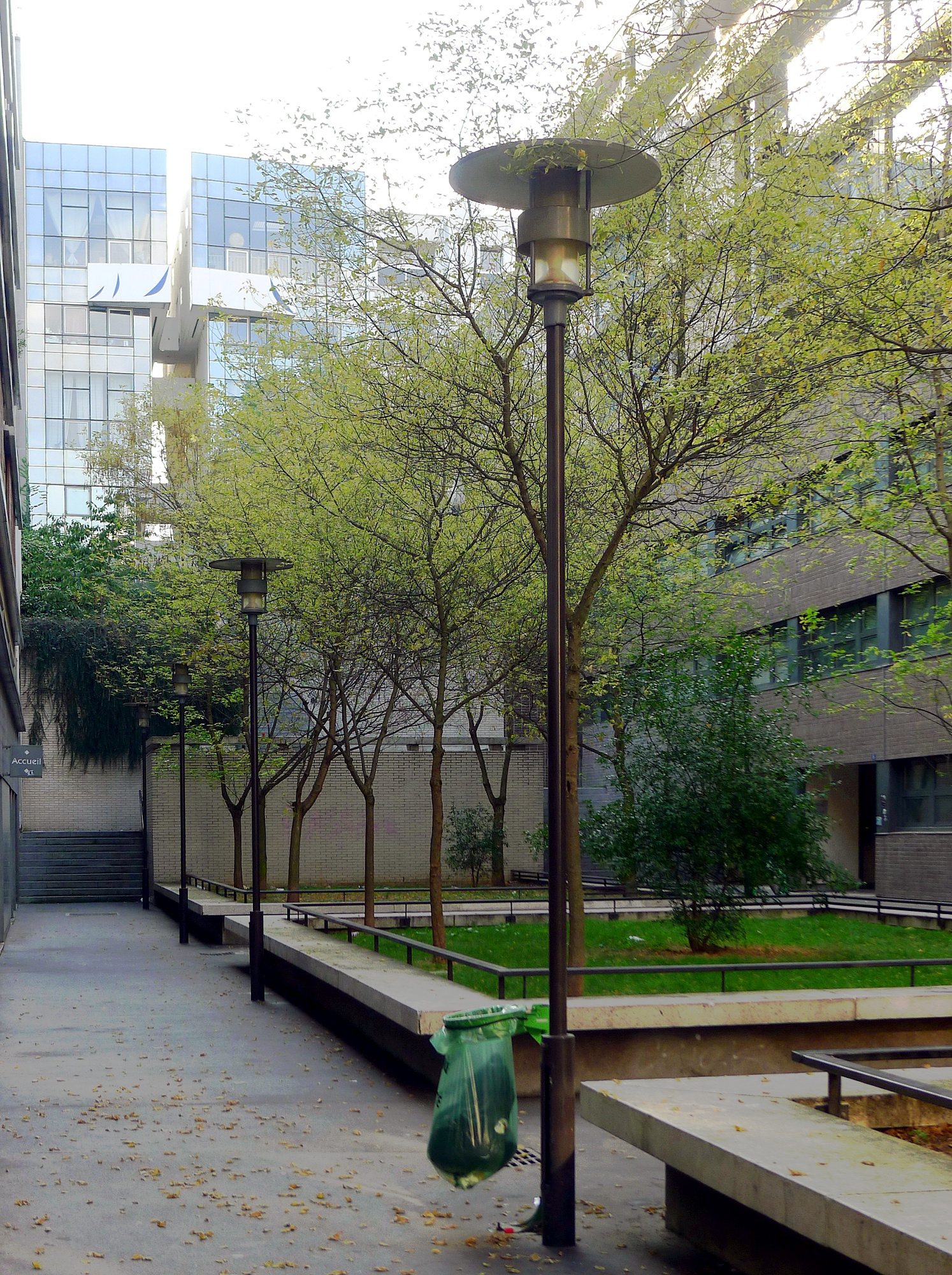 Rue Trolley-de-Prévaux - Paris XIII